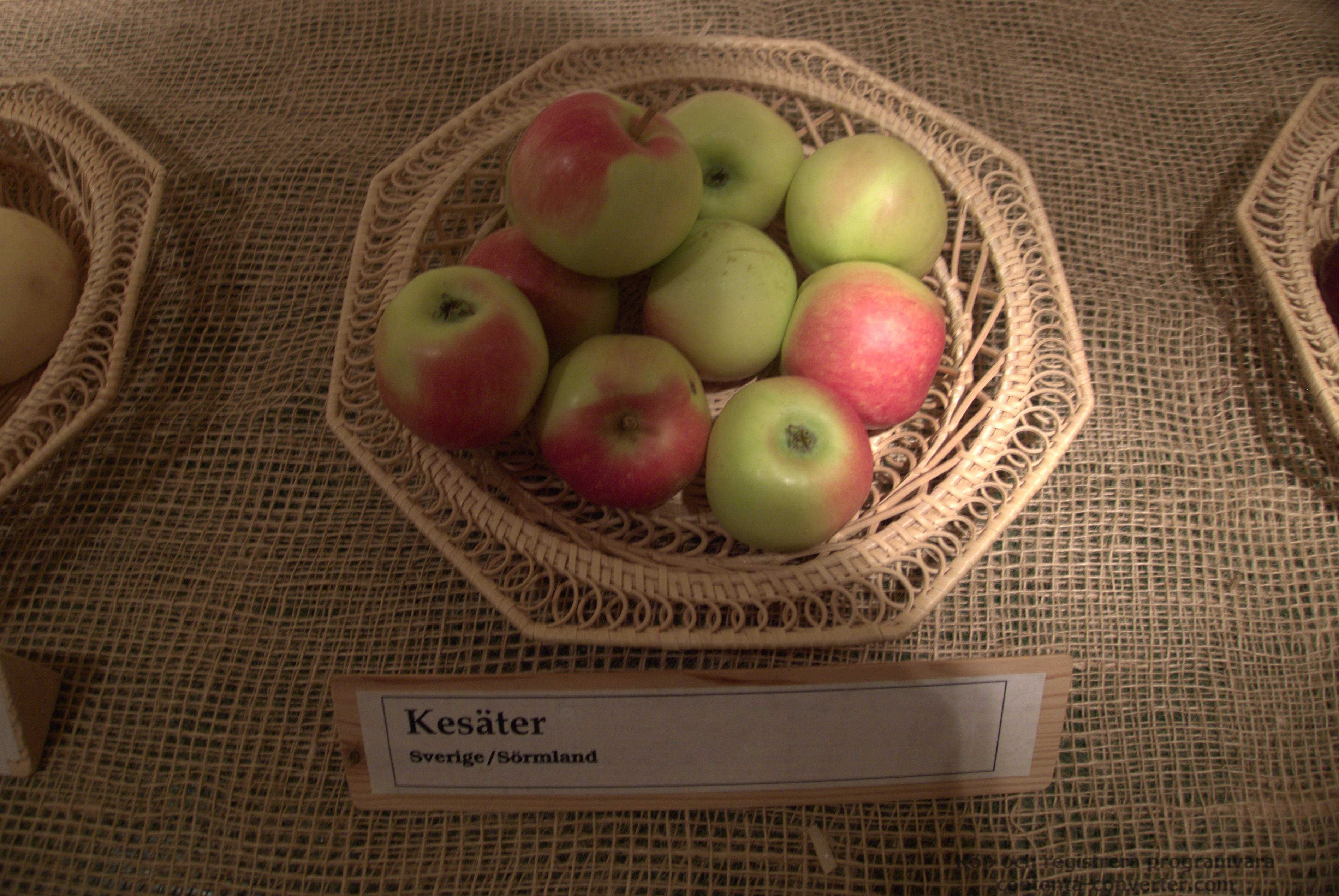 Äpplen av sorten Kesäter